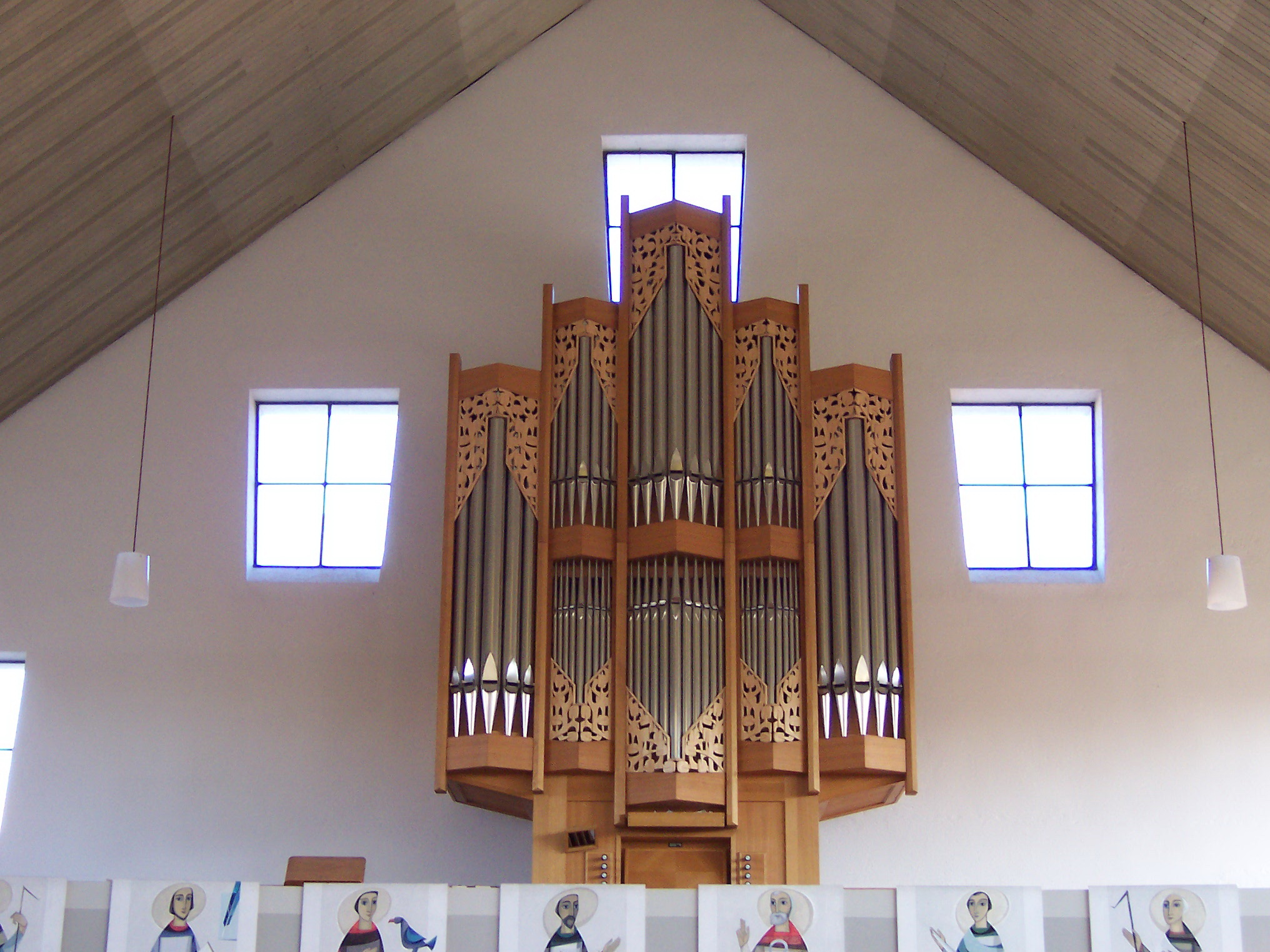 Pfarrkirche St. Vinzenz von Paul in Auloh, einem Stadtteil im Osten der niederbayerischen Bezirkshauptstadt Landshut. Moderner Kirchenbau, der in den Jahren 1961/62. Orgel.